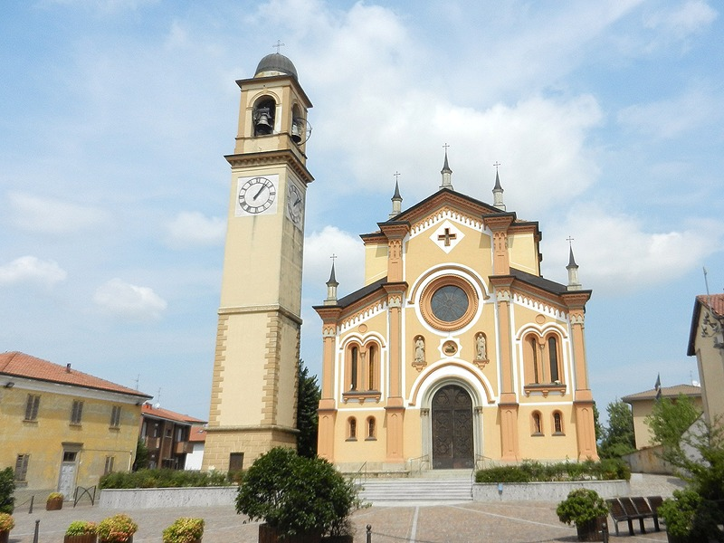 Basiano - Chiesa Parrocchiale di S. Gregorio Magno